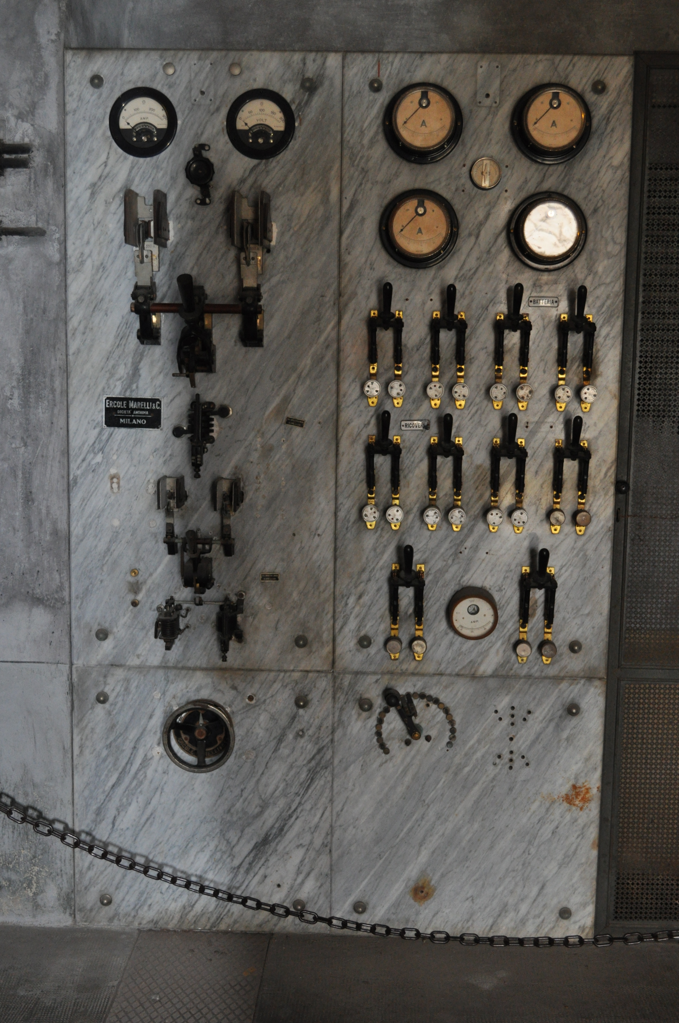 Pannello di controllo del generatore elettrico che serviva il forte, posizionato nell'edificio principale antistante la piazza d'armi